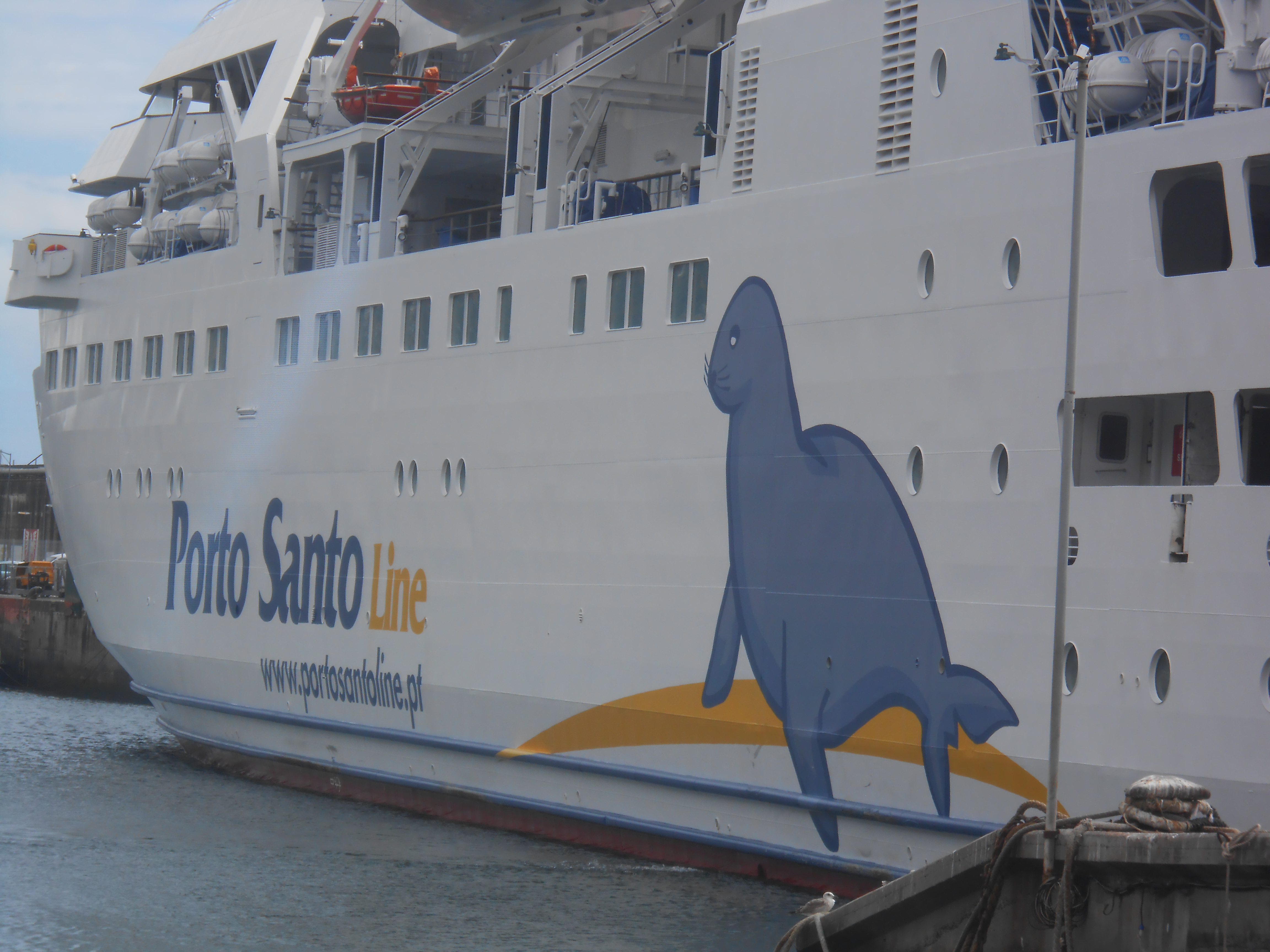 Logótipo da Porto Santo Line no navio Lobo Marinho